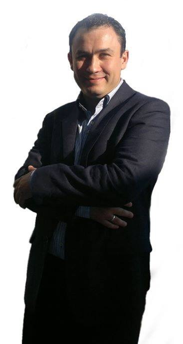 Српски (ћирилица): Бранко Вујковић